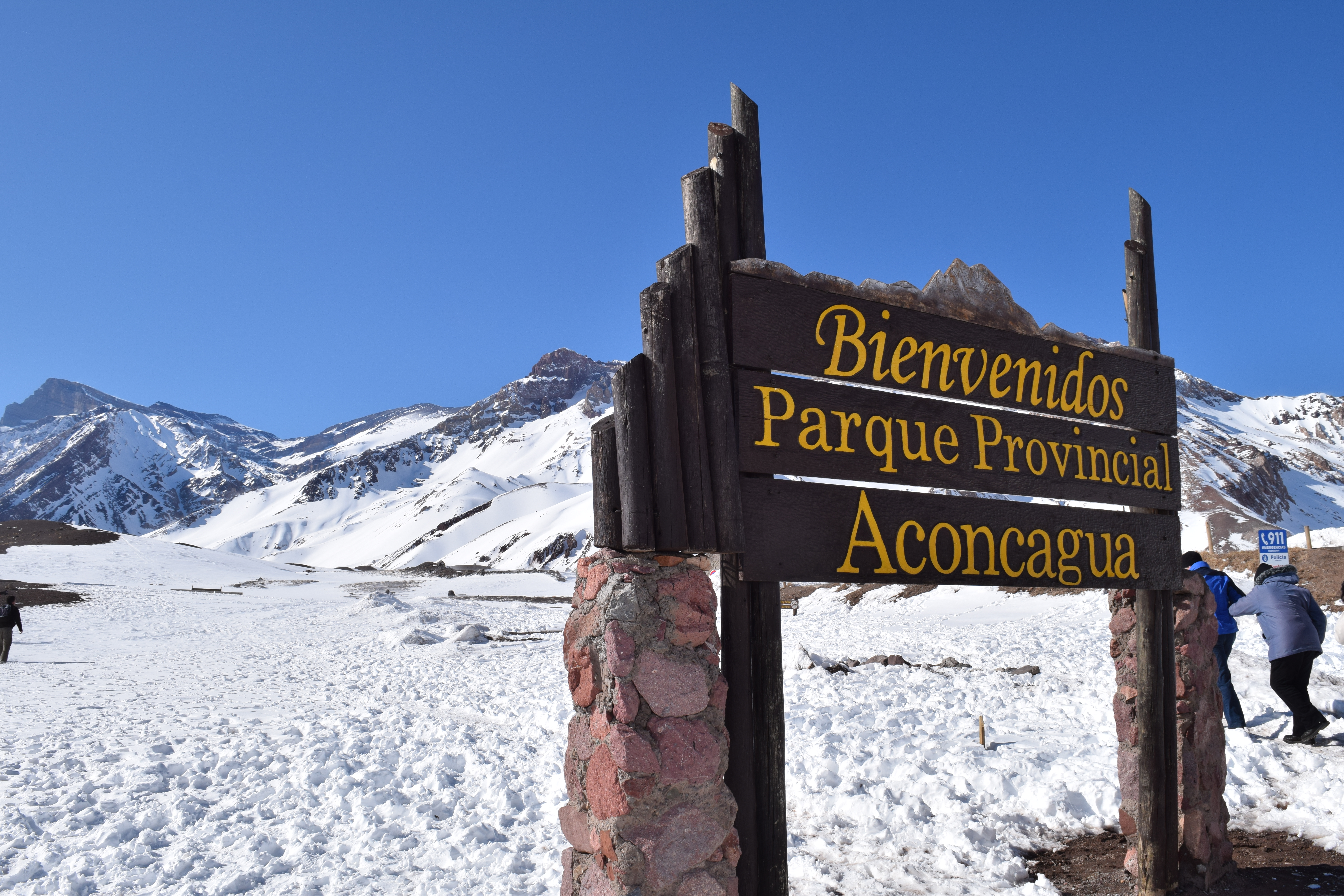 El parque Provincial Aconcagua en Invierno.